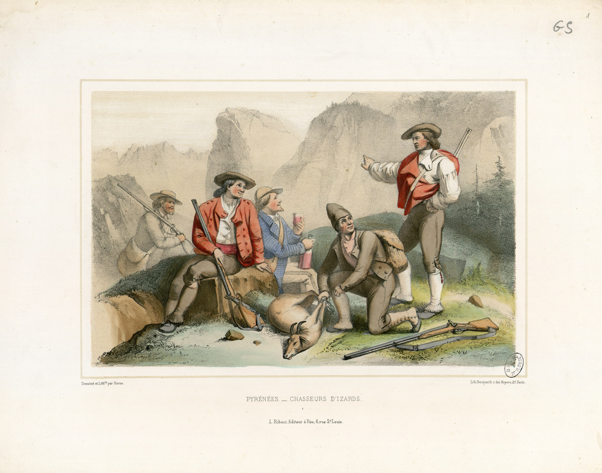 Fait partie d'un album 25 planches en camaïeu et 8 en couleurs, dessinées et lithographiées par Gorse chez Becquet à Paris, éditées par Ep. Monguillet à Pau. Les pl. 3, 5, 7, 8, 9, 10, 11, 23, 24, 26, 28, 32 sont éditées chez L. Ribaut, à Pau. Titre lithographié : vignette "Berger et son chien". A l'origine : 28 lithographies encadrées d'un filet noir. Ici, 3 lithographies manquantes et 8 lithographies en coul. extraites d'un autre album (?). Comme pour tous les albums de cette époque, la composition en lithographies varie considérablement selon les exemplaires. Pièce jointe : feuillet ms répertoriant les pl. de l'album. Ancely, René (1876 - 1966). Possesseur